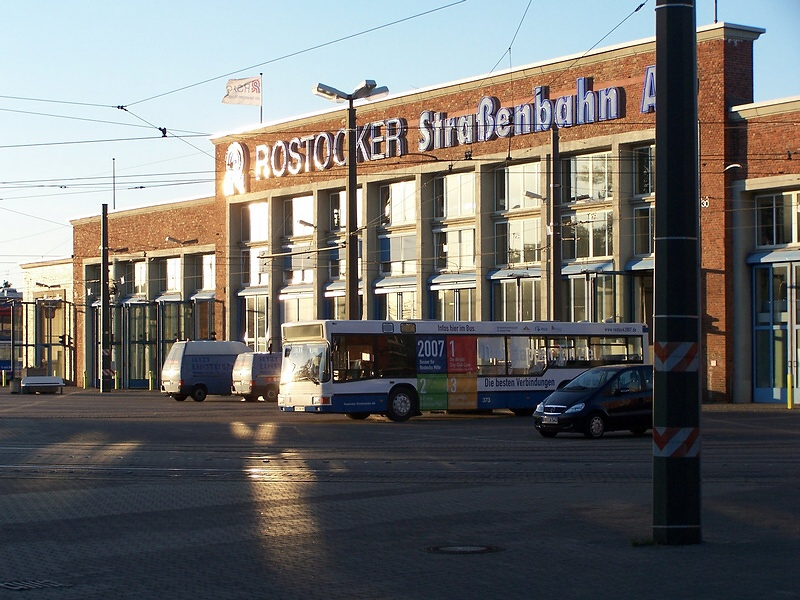 Straßenbahndepot der RSAG in der Hamburger Straße